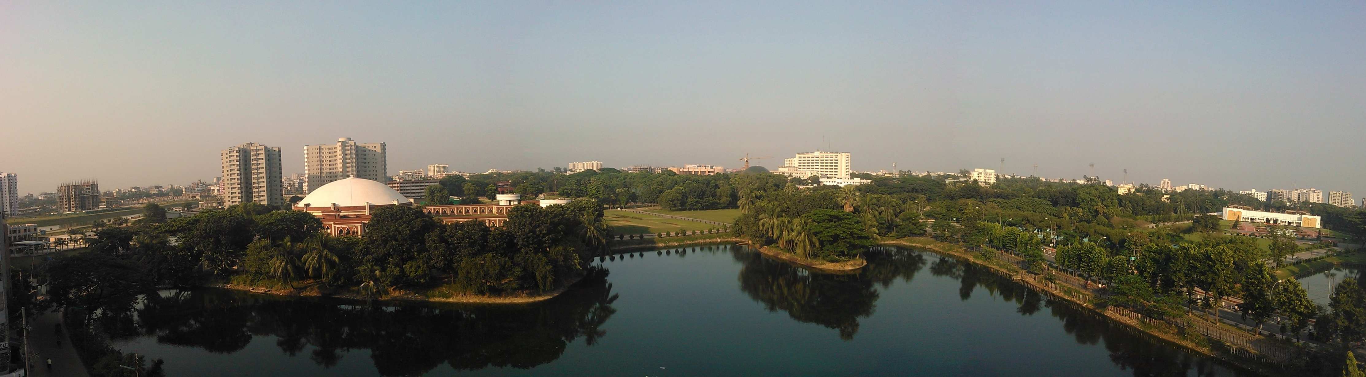 Cantonment Central Mosque and Senakunja